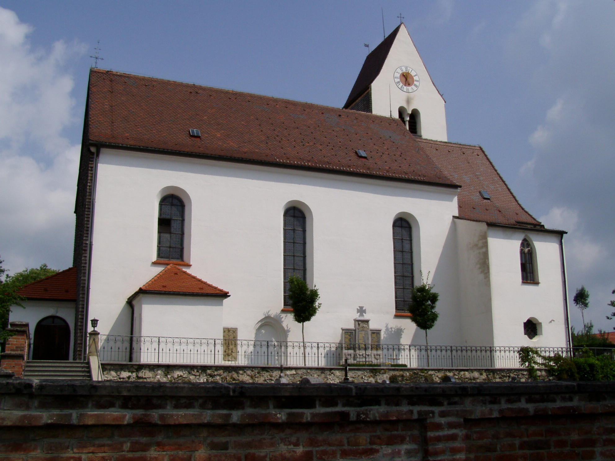 Kirche in Schwabbruck, Lkr Weilheim-Schongau